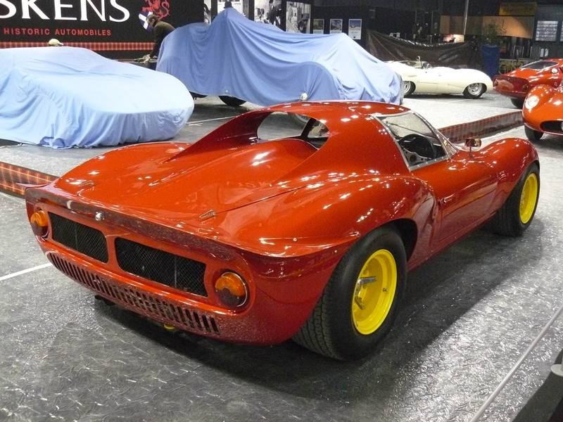 Retromobile 2012